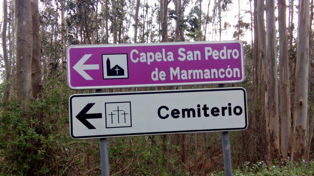 Acceso a Marmancón, Ferrol.